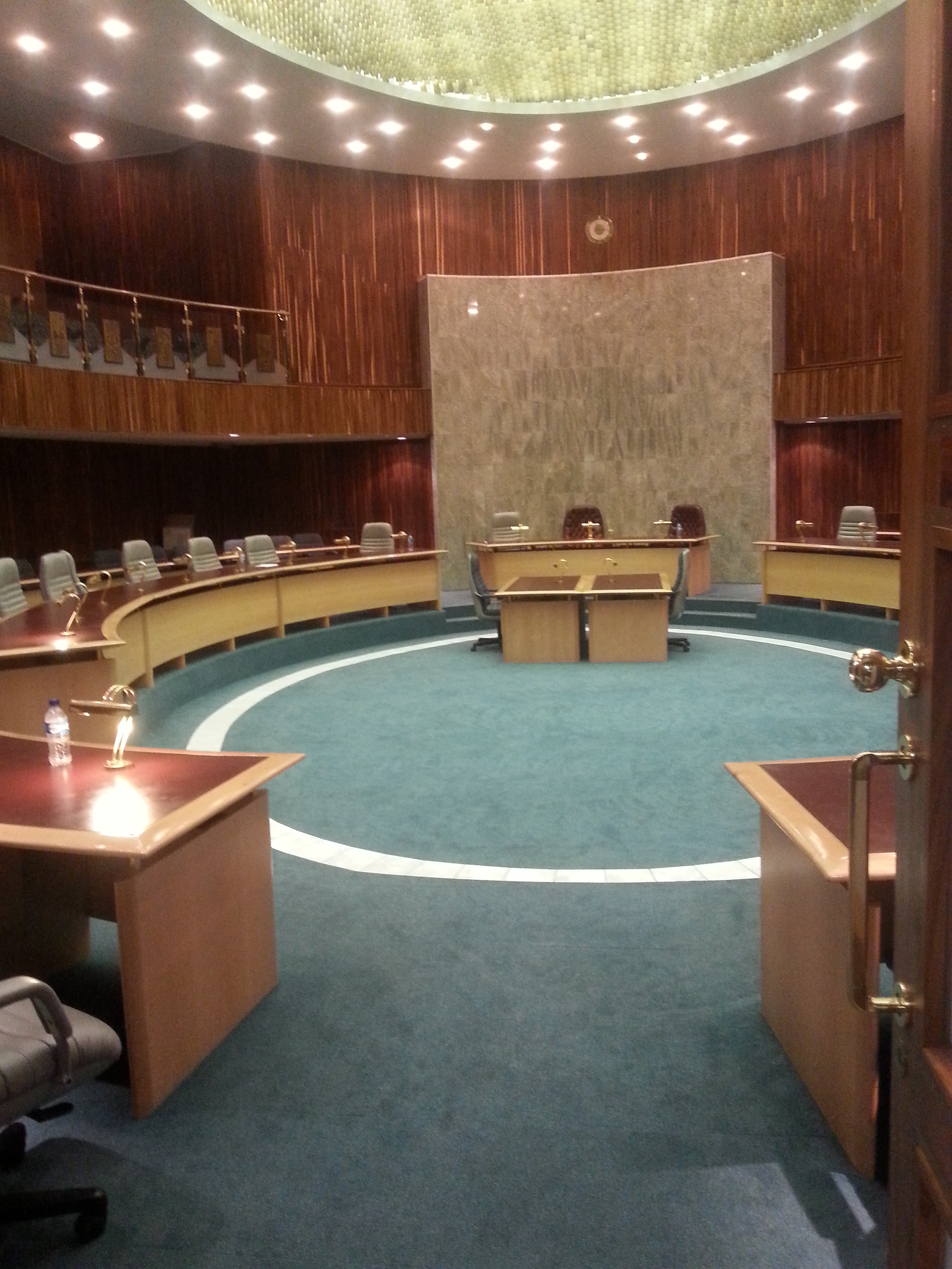 Plenarsaal im Büro des Premierministers (Namibia)